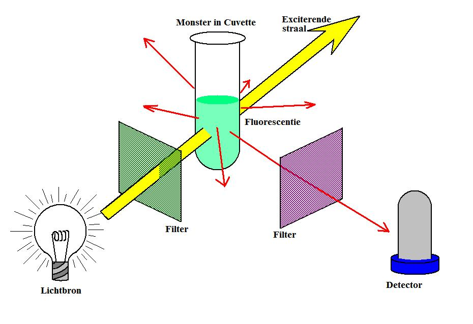 Vereenvoudigde schematische weergave van de werking van een fluorimeter